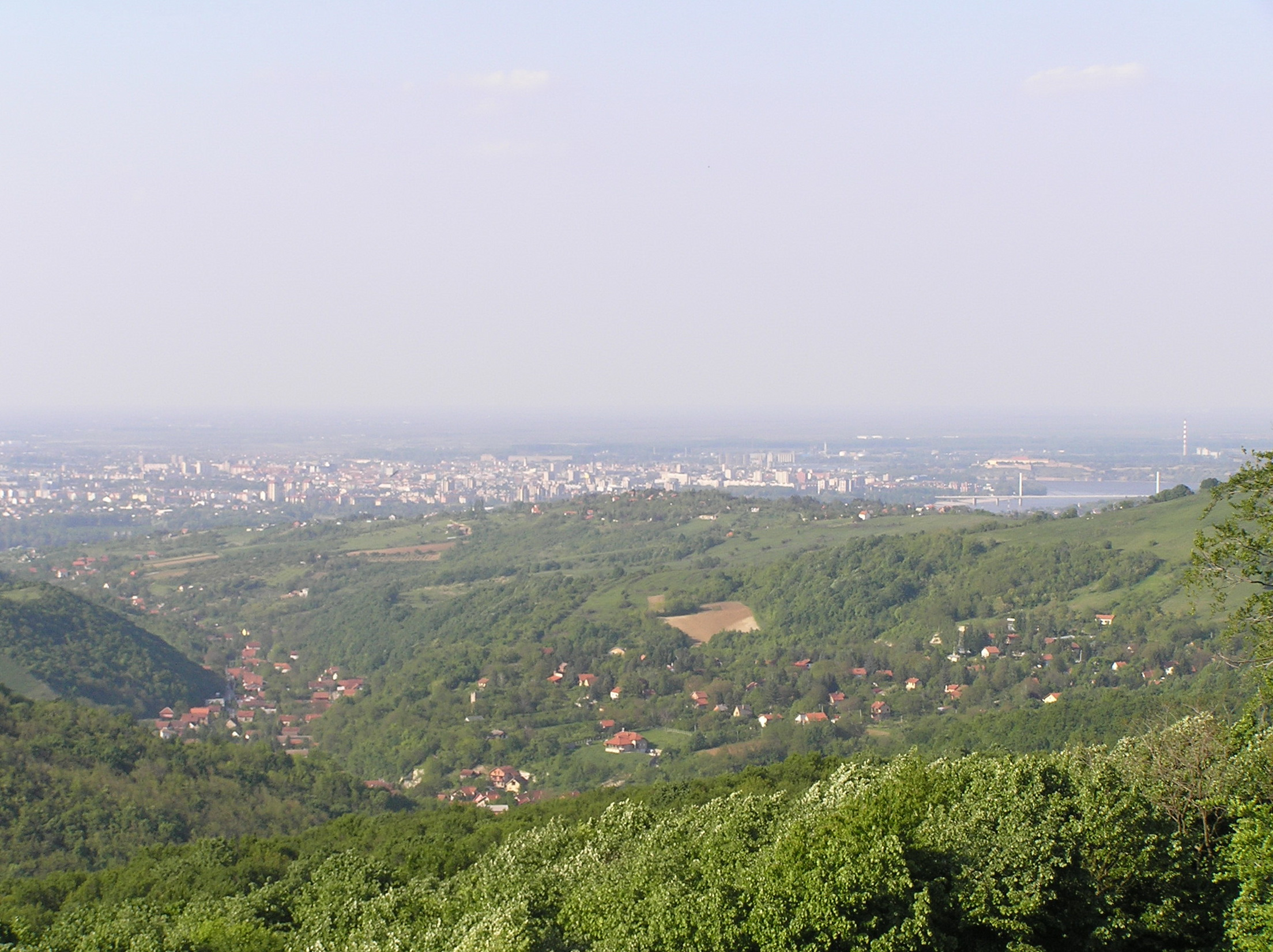 Ово је фотографија заштићеног природног добра у Србији под шифром: НП01 This is a a photo of a natural area in Serbia with ID: НП01 Pogled na Ledince i Novi Sad u daljini sa vidikovca iznad Ledinaca